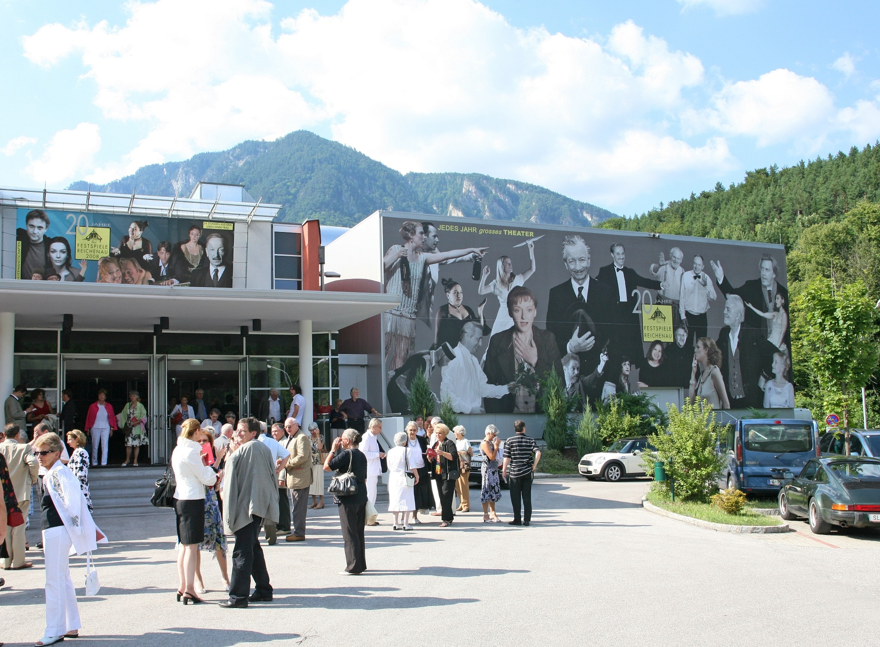 Aussenansicht des Neuen Spielraums der Festspiele Reichenau